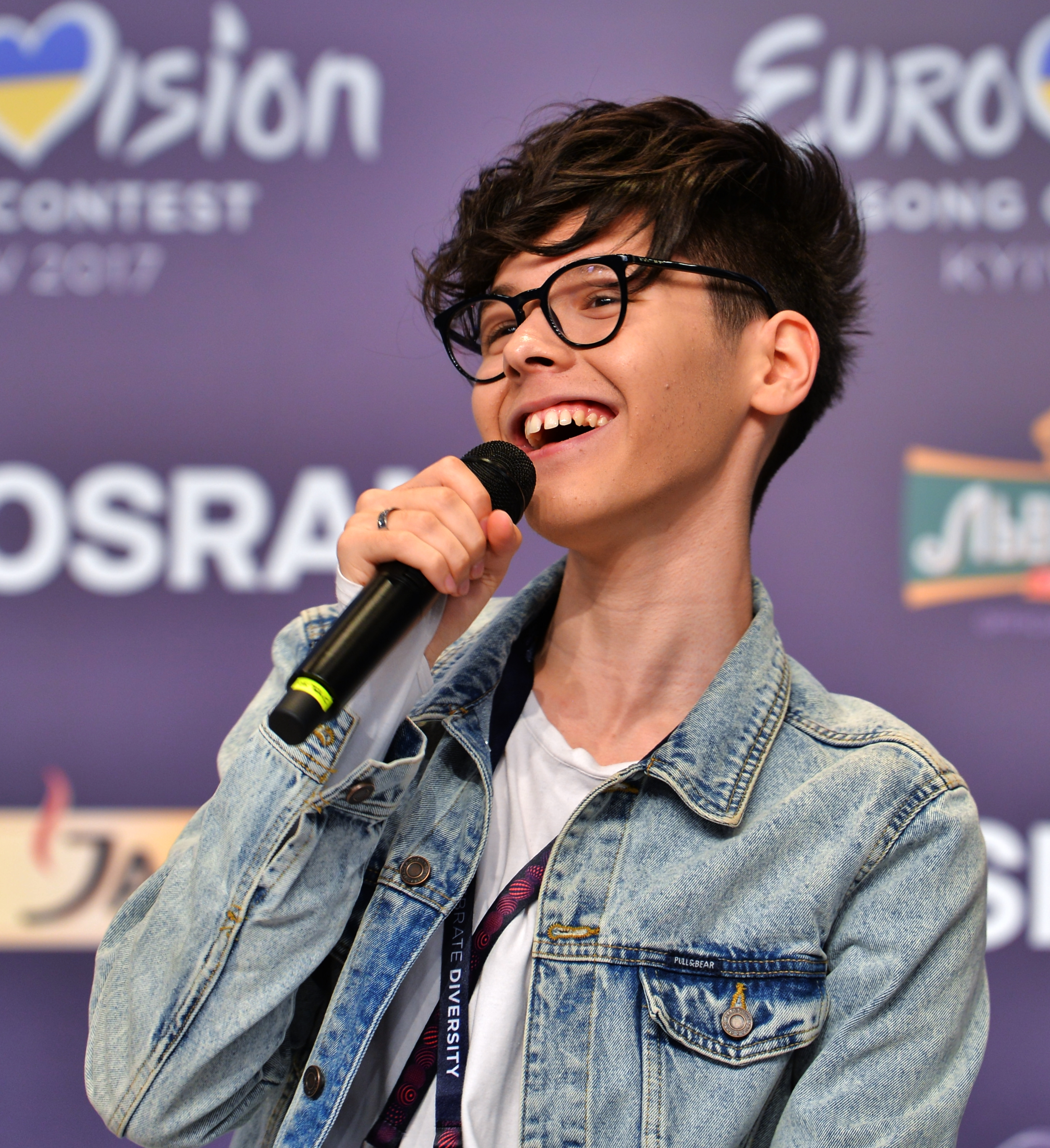 Болгарський співак Крістіан Костов на прес-конференції пісенного конкурсу Євробачення 2017 у Києві